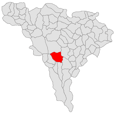 Categorie:Hărţi ale judeţului Alba